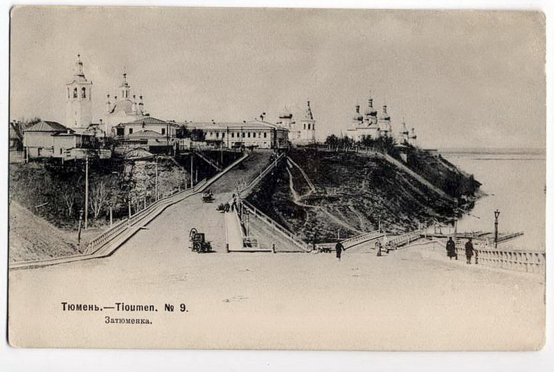 Дореволюционная открытка с видом Затюменского мыса. Представлены Крестовоздвиженская церковь, Никольская площадь, мост через Тюменку, Дунькин сад, Свято-Троицкий собор и спуск к Туре.